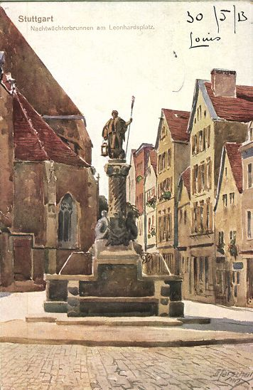 Stuttgart. Nachtwächterbrunnen an der Leonhardskirche. (Ansichtskarte)